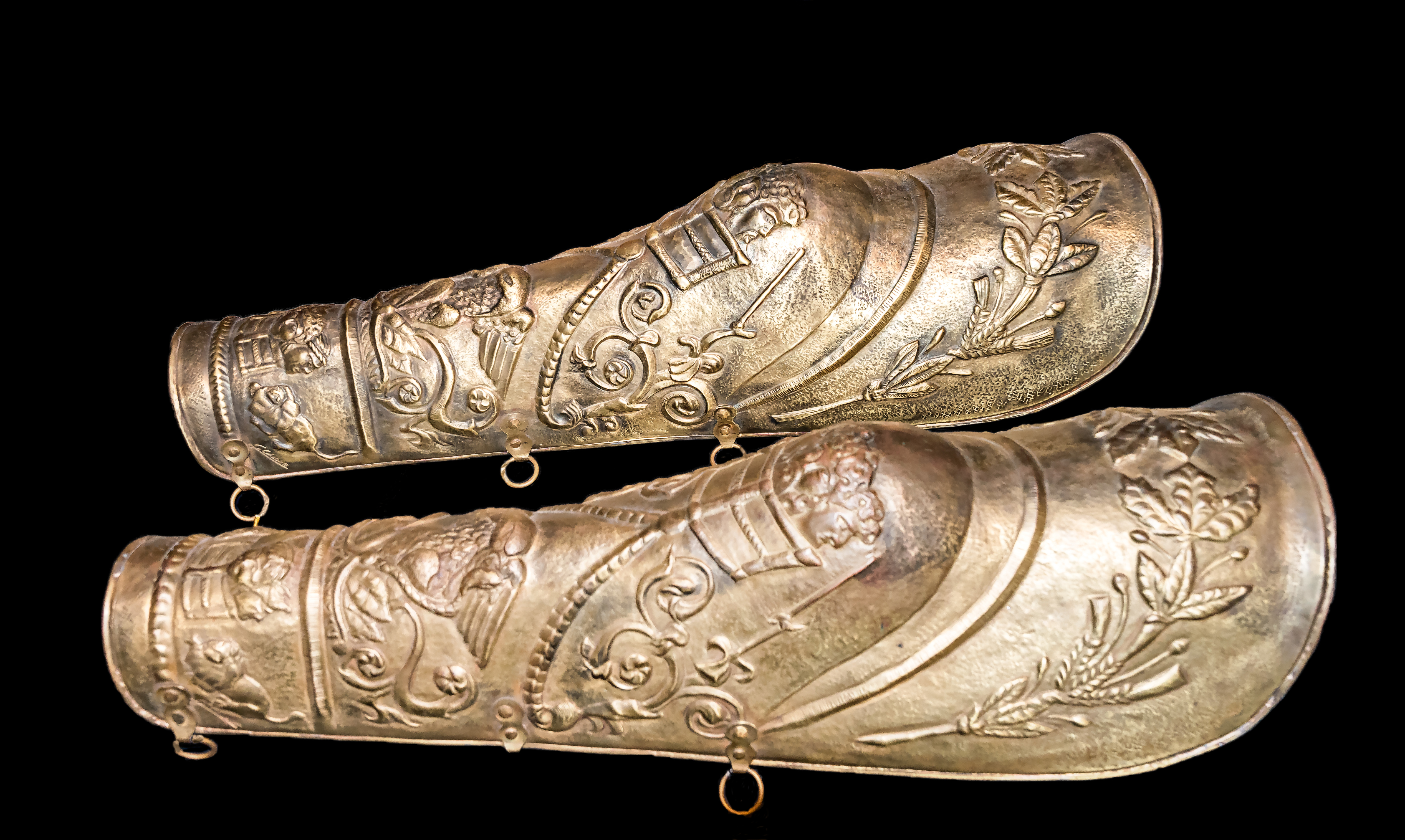 Moderne Nachbildungen von Ocreae (Beinschienen), die von römischen Militärangehörigen und von Gladiatoren getragen wurden.